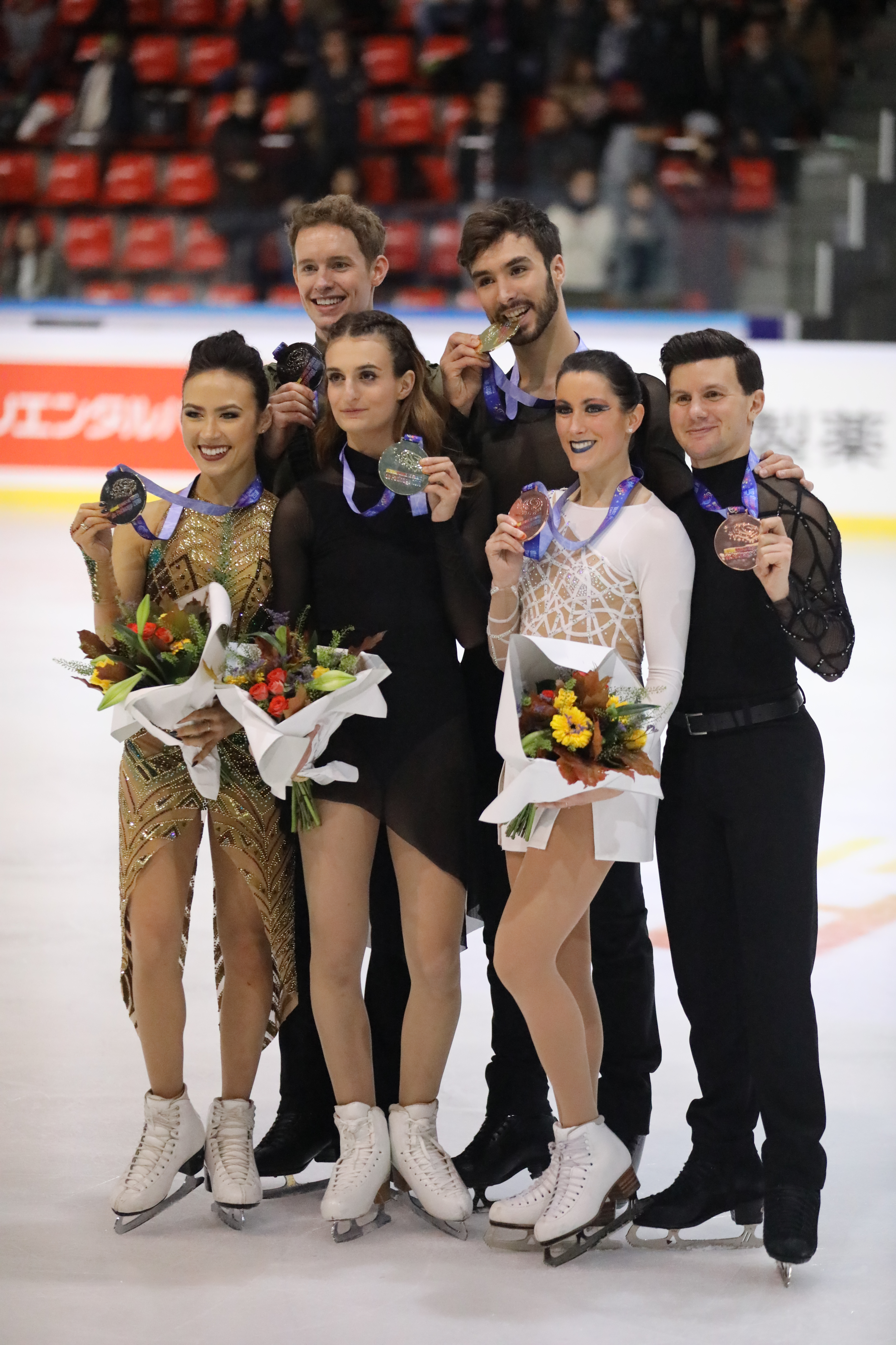 Médaillés en danse sur glace aux Internationaux de France 2019.